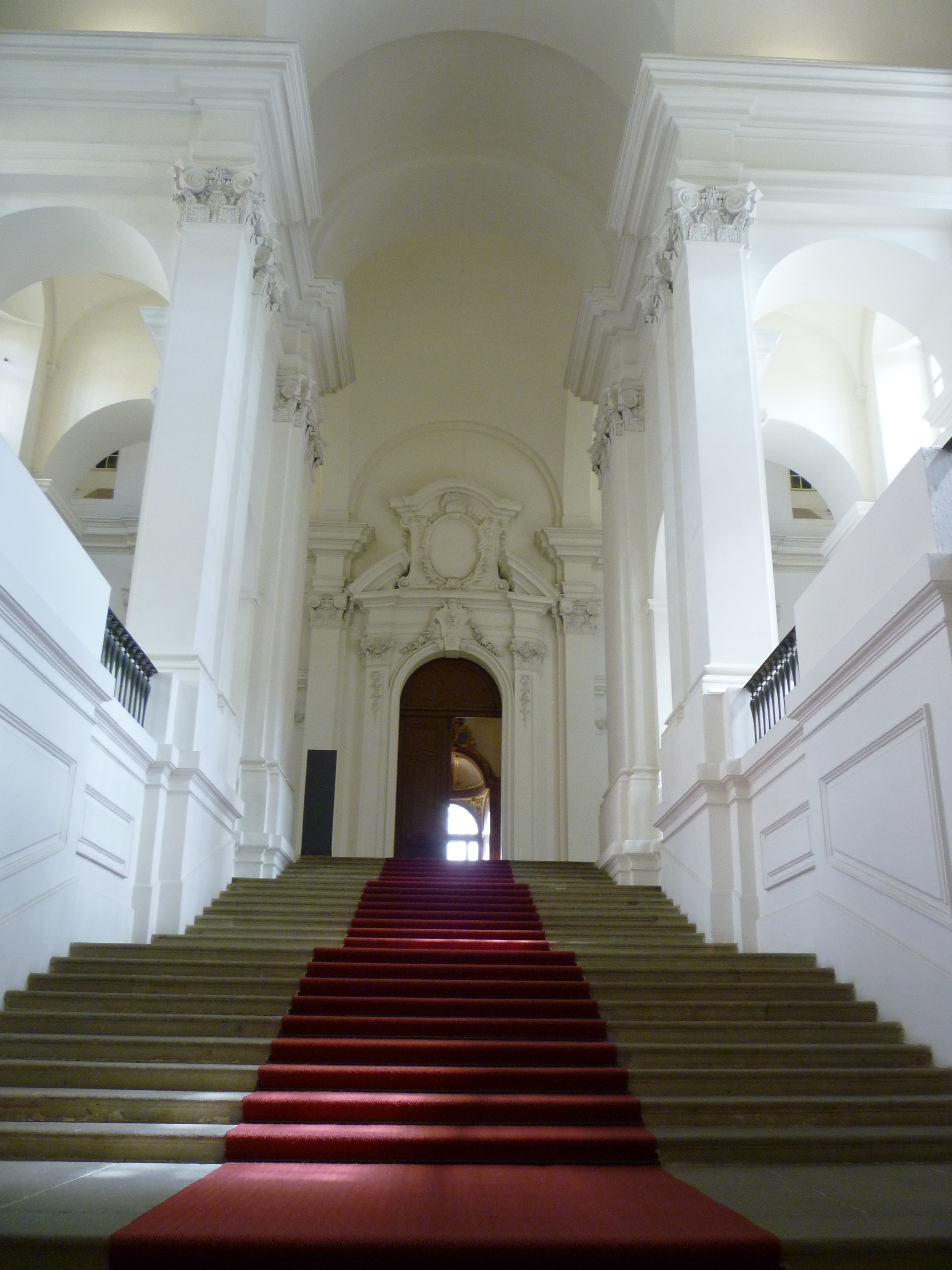 Kaiserstiege im Stift Klosterneuburg